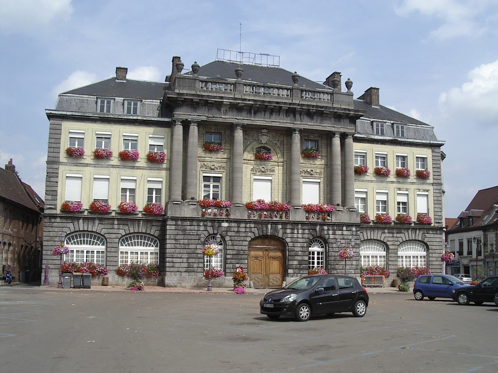 Mairie de Condé-sur-l'Escaut